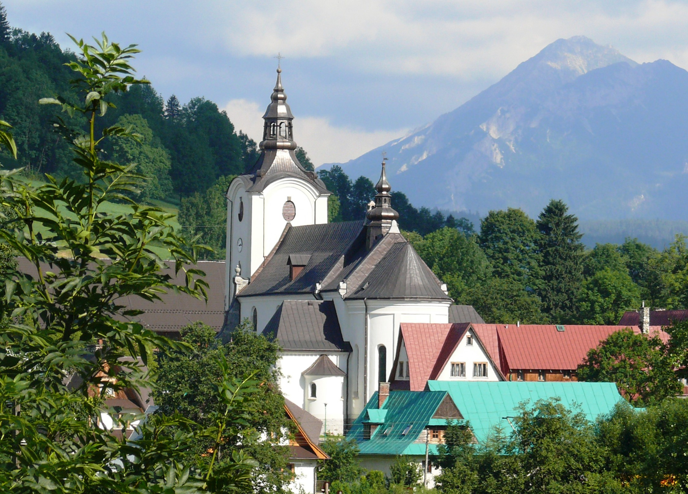 Kościół św.Marii Magdaleny w Poroninie.